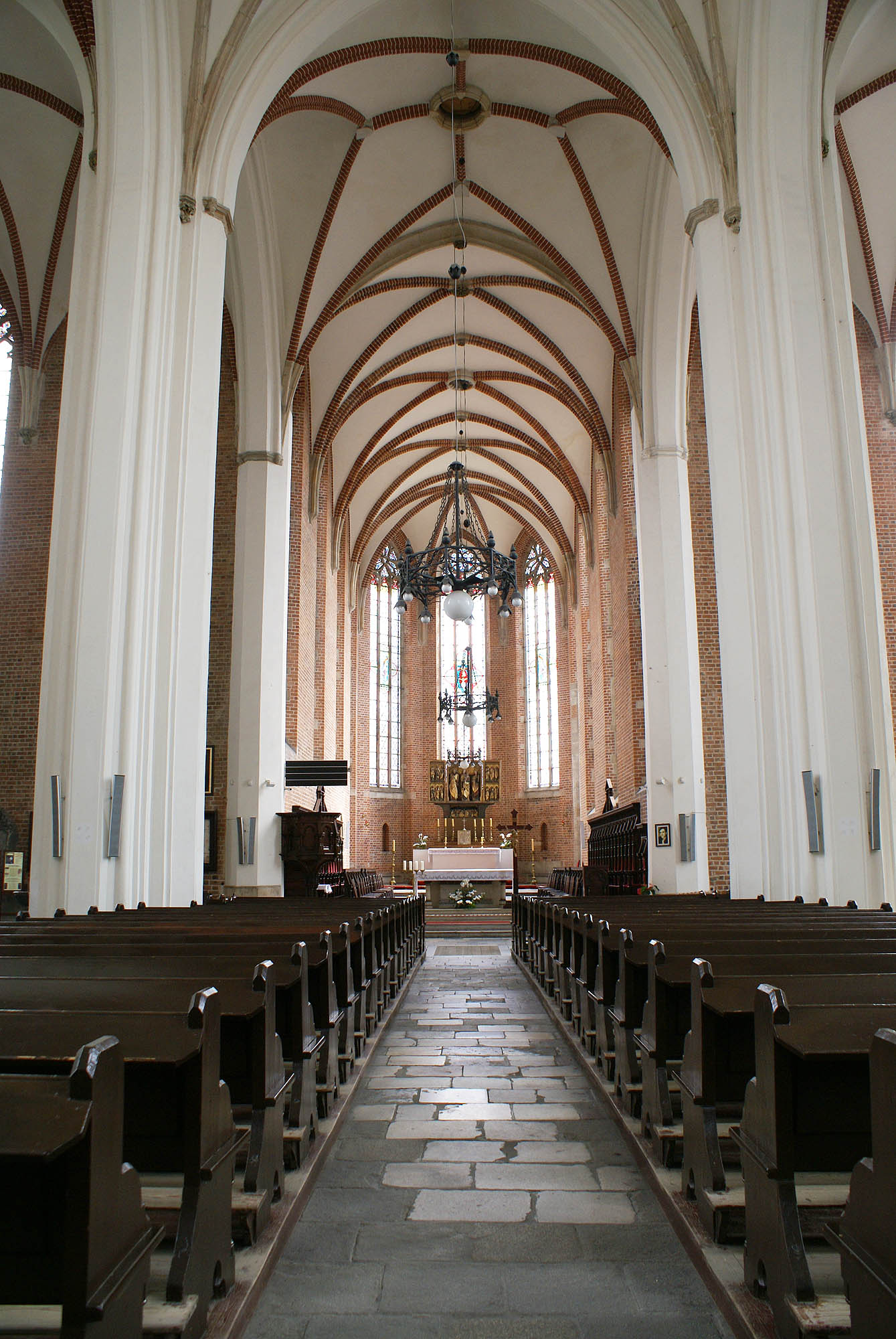 Wrocław, kościół p.w. Św. Krzyża, XII, XIV